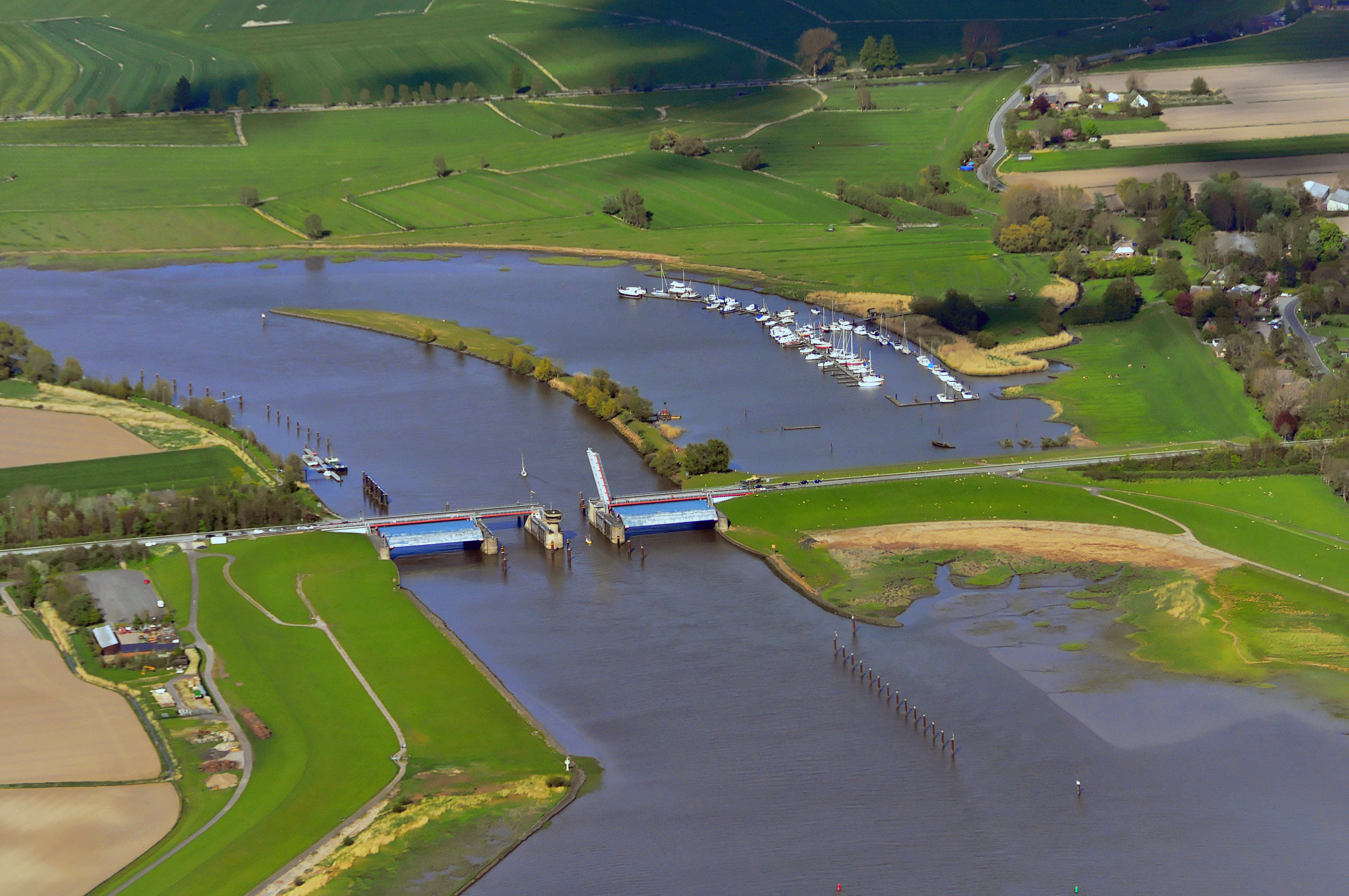 Luftbilder von der Nordseeküste 2012-05